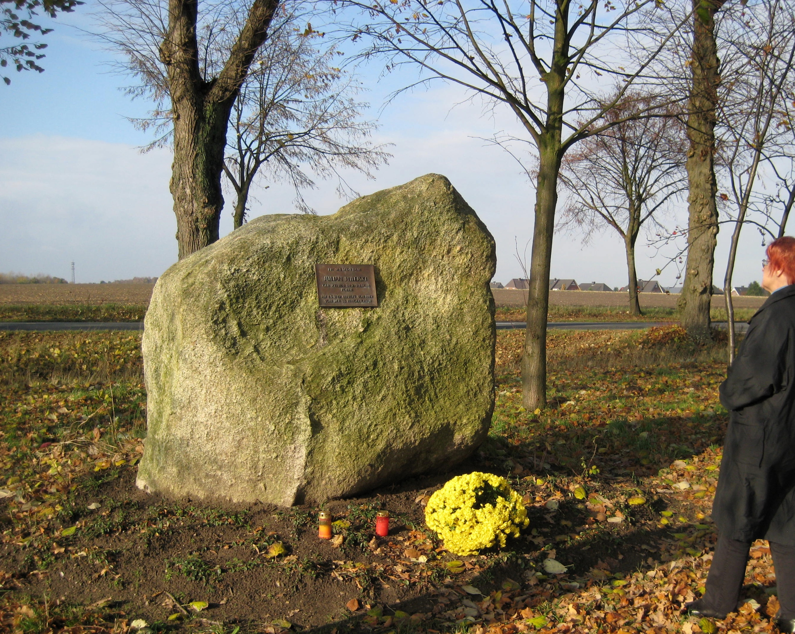 Gedenkstein für Julian Milijski in Stelle (Landkreis Harburg) in Niedersachsen, Deutschland